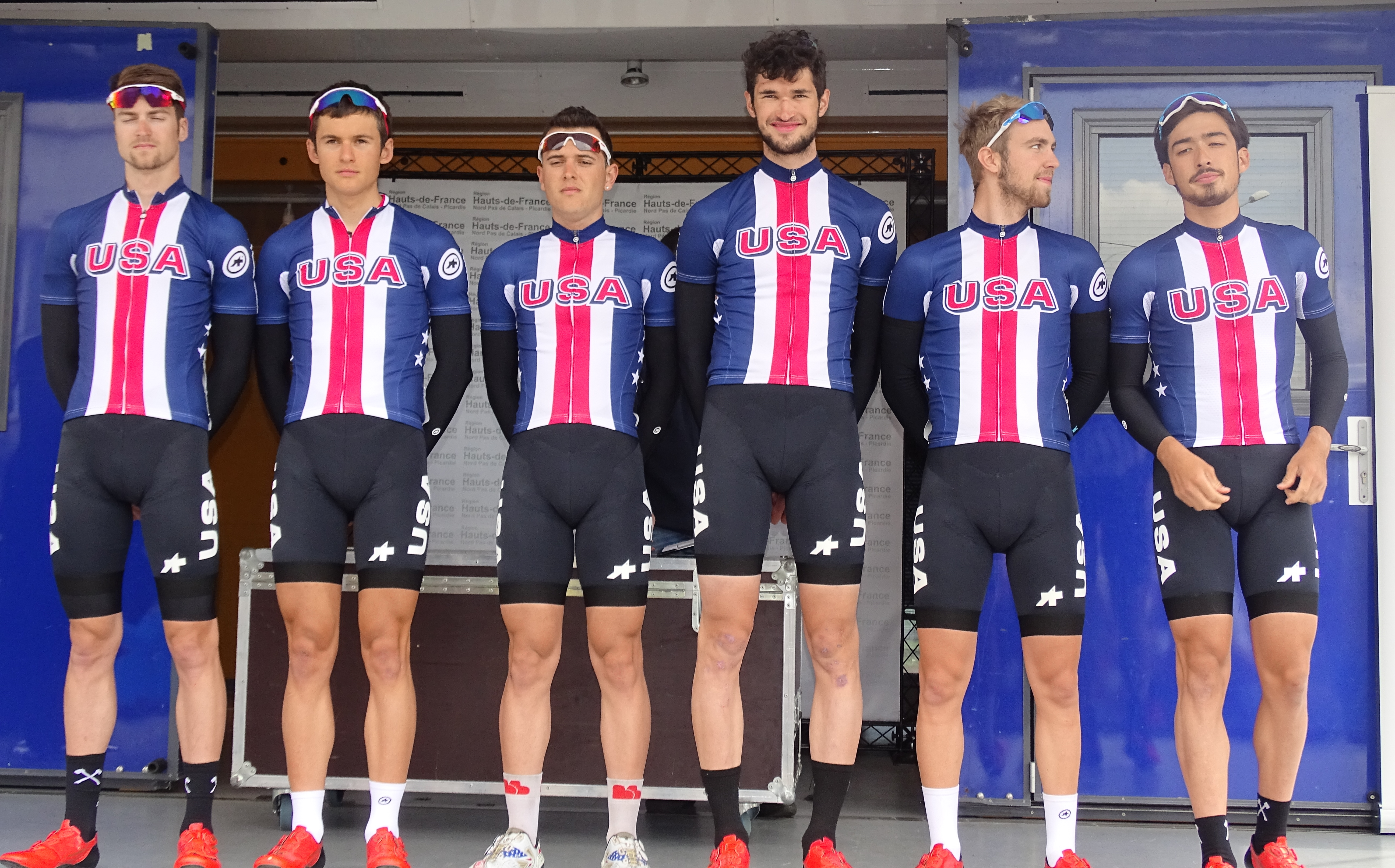 Reportage réalisé le vendredi 20 mai 2016 à l'occasion du départ de la première étape du Paris-Arras Tour 2016 à Douchy-les-Mines, Nord, Nord-Pas-de-Calais-Picardie, France.